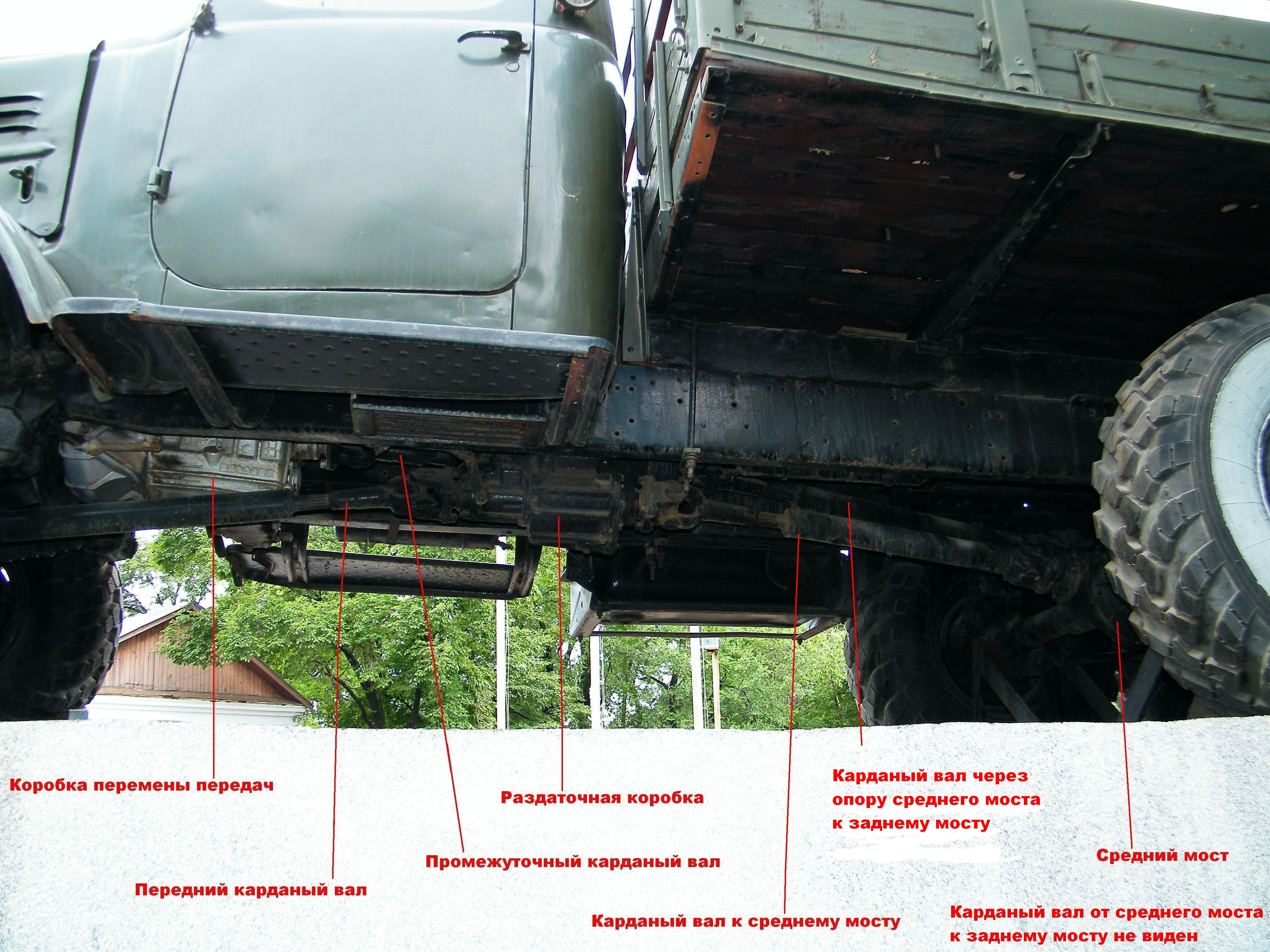 ЗИЛ-157 снизу